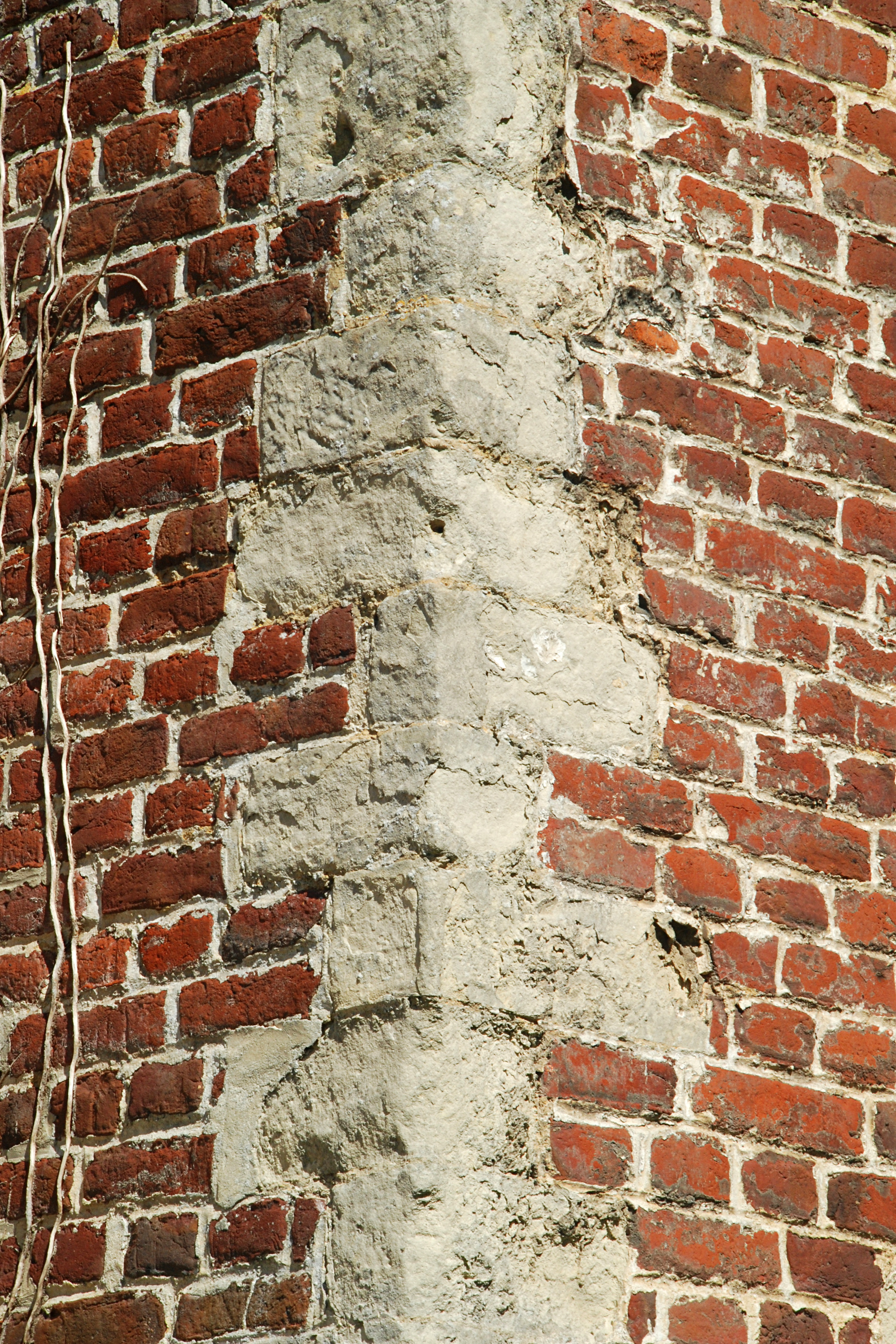 Belgique - Brabant wallon - Genappe - Glabais - Église Saint-Pierre